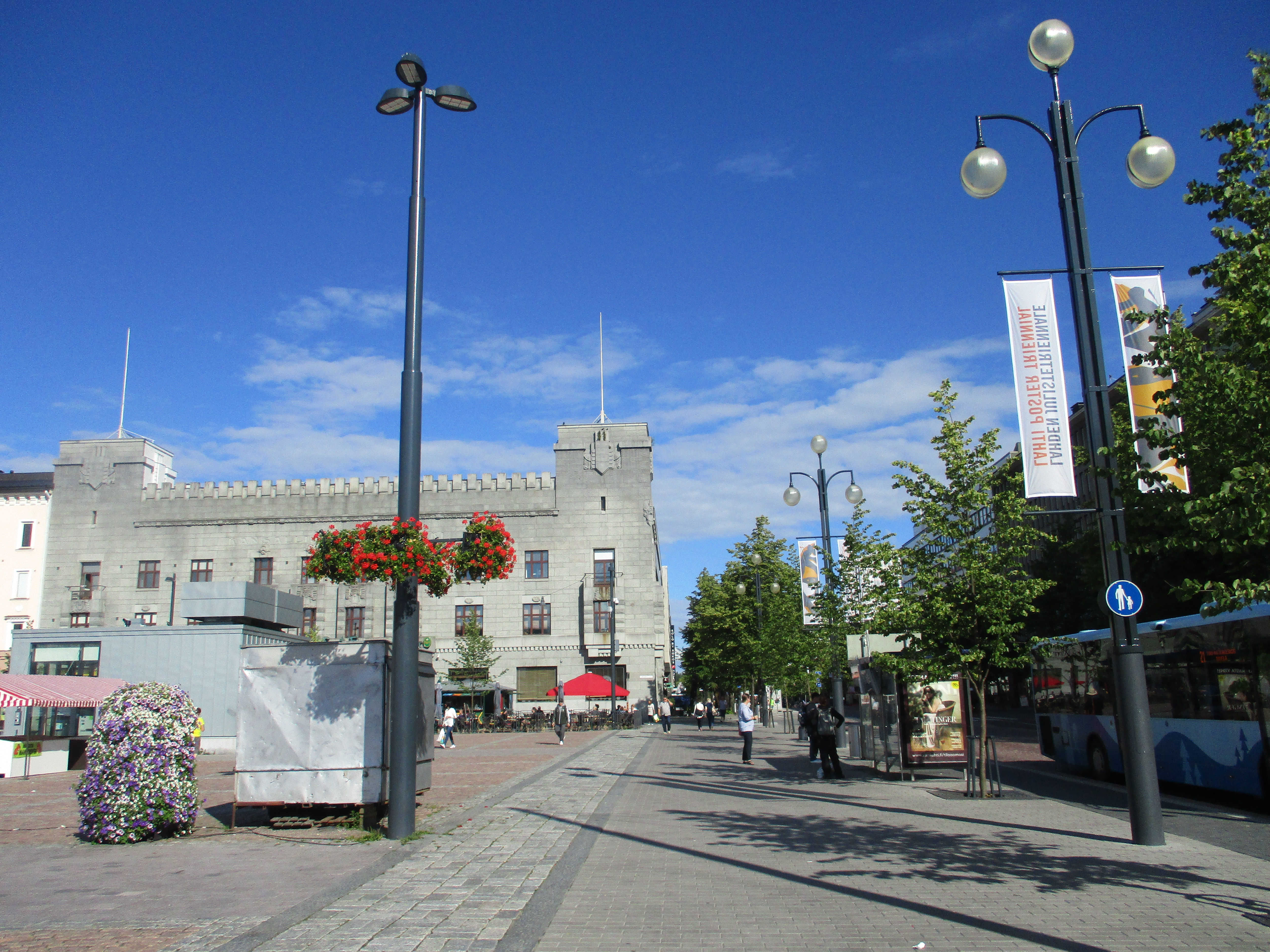 Lahden kauppatori